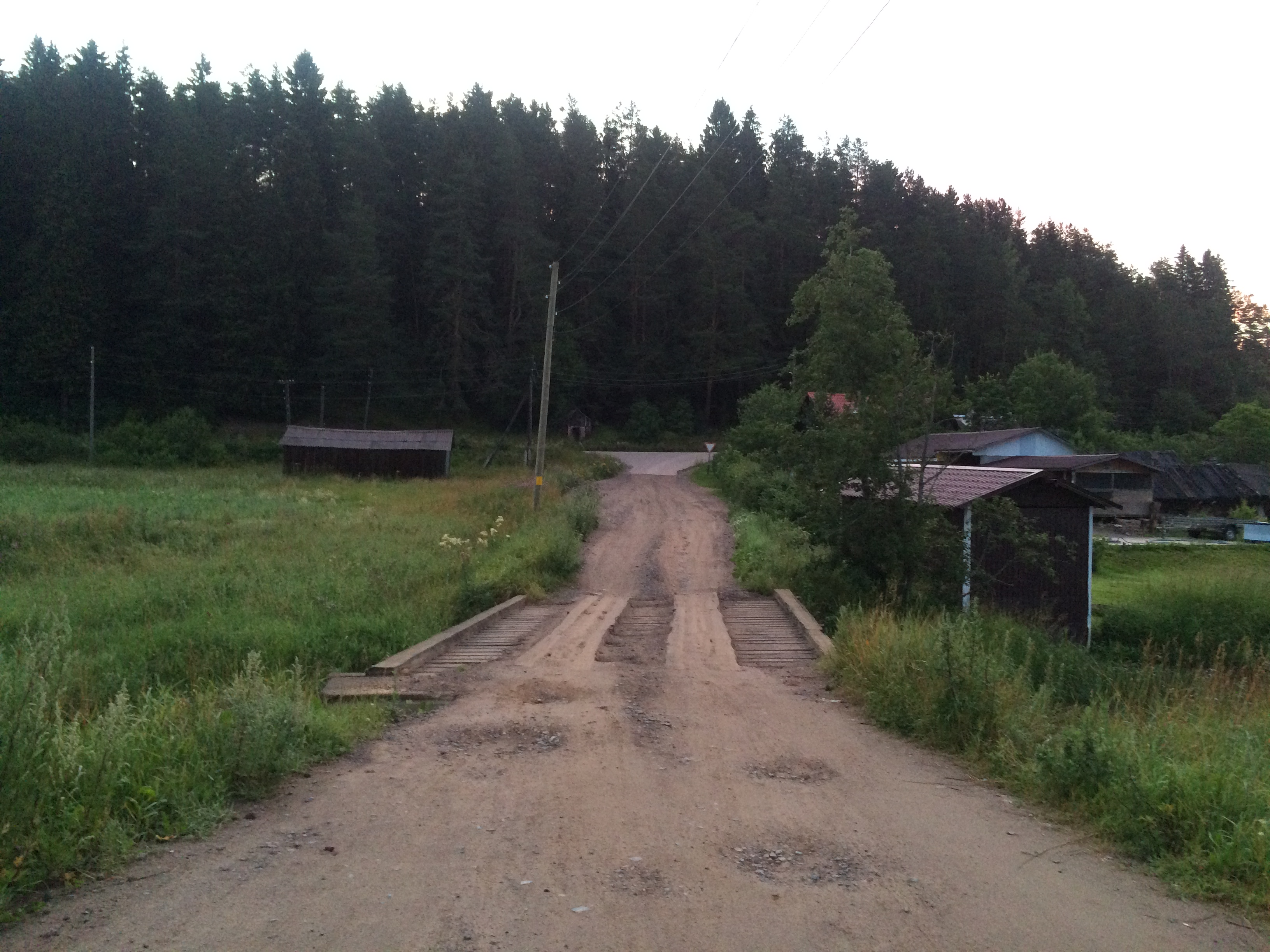 Вонкаоя